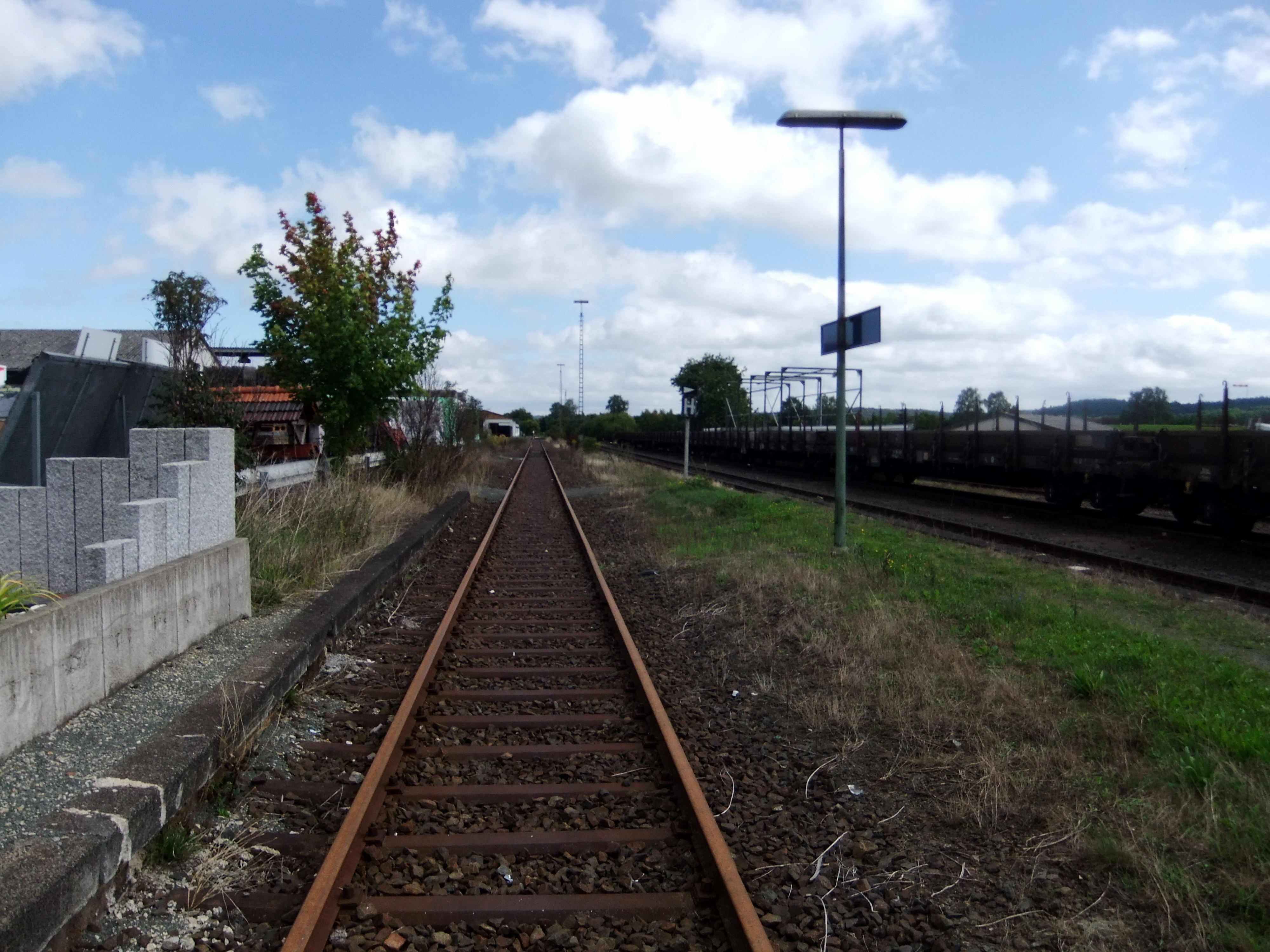 Allendorfské nádraží, Německo